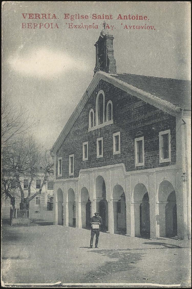 Църквата "Свети Антоний" в Бер